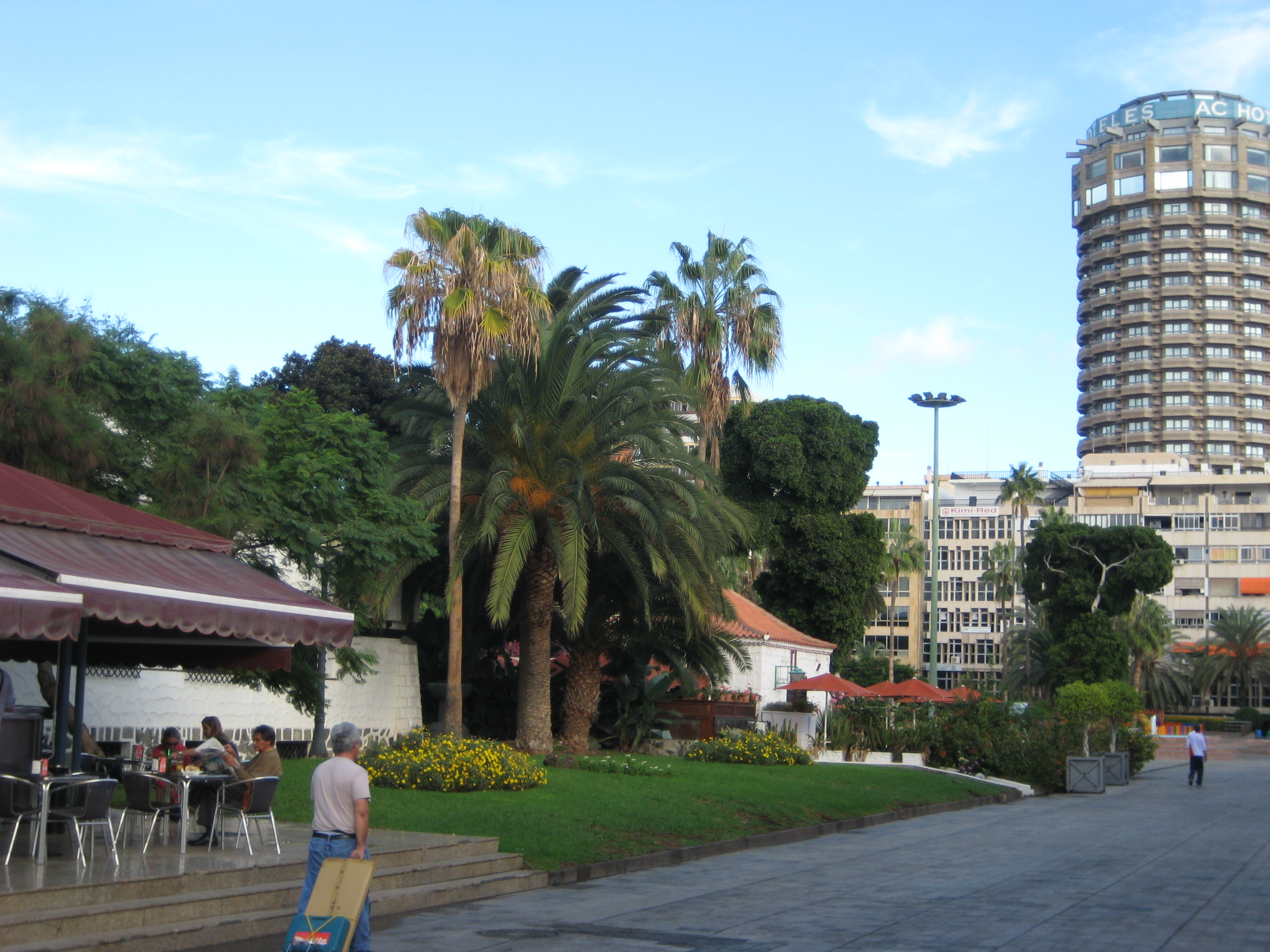 Panorama Las Palmas 4